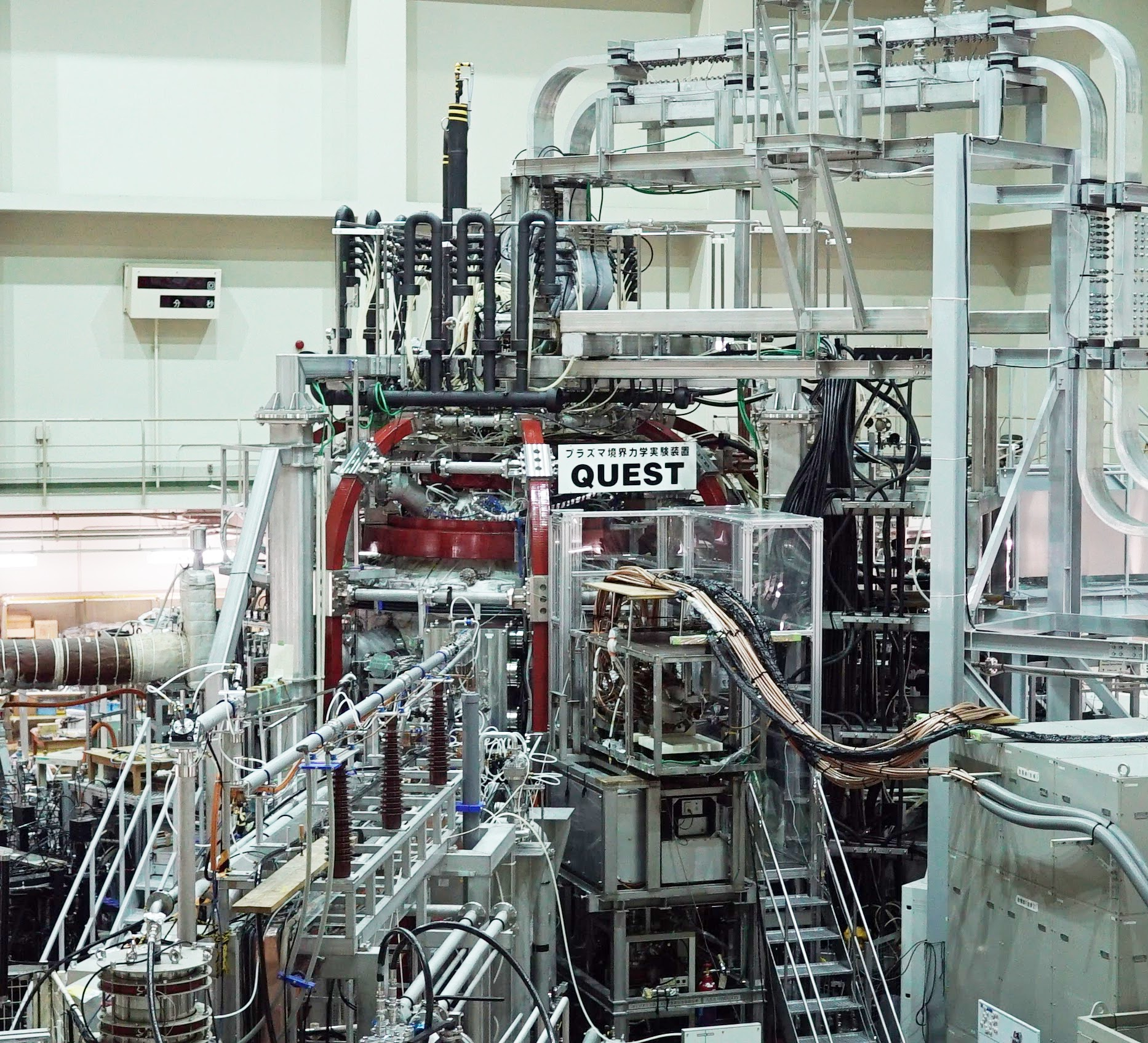 QUEST本体写真